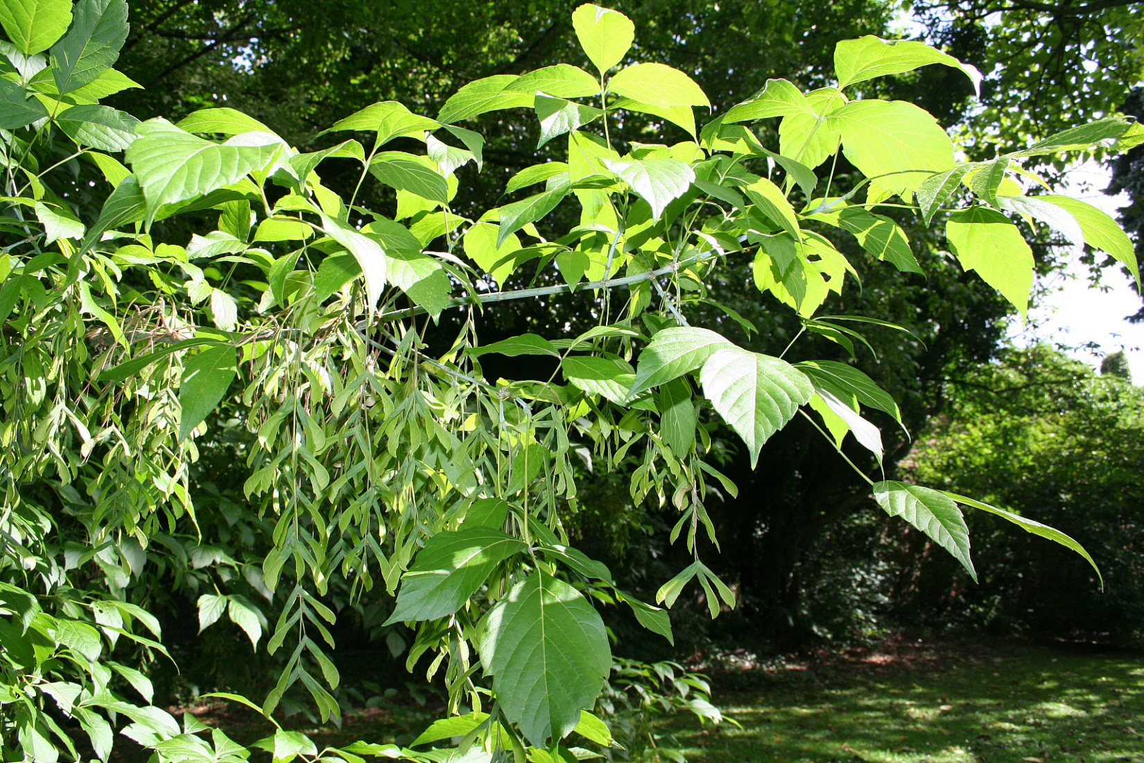 Feuilles et samares de l'érable à feuilles de frêne (Acer negundo)